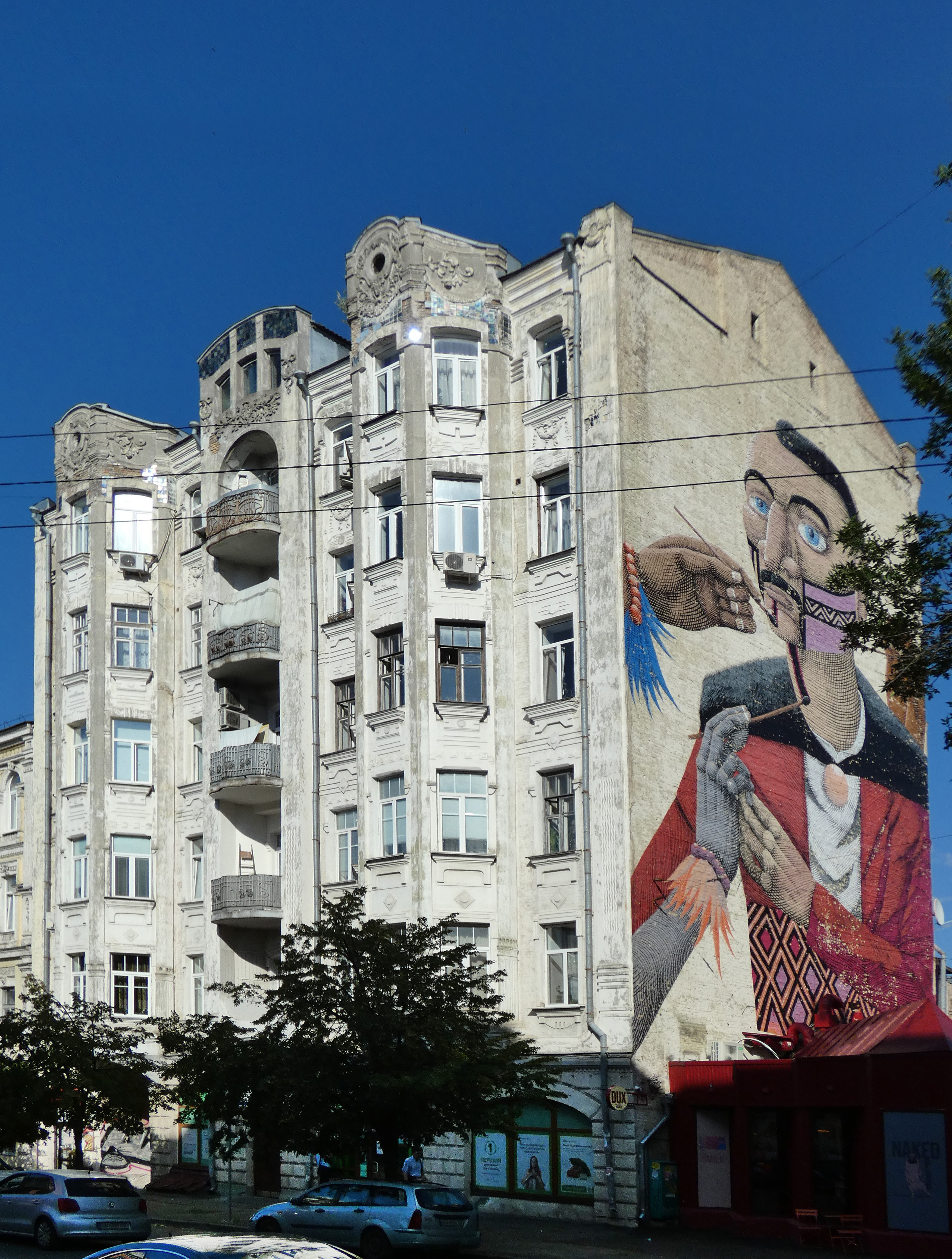 Будинок прибутковий, Київ, Спаська вул., 6